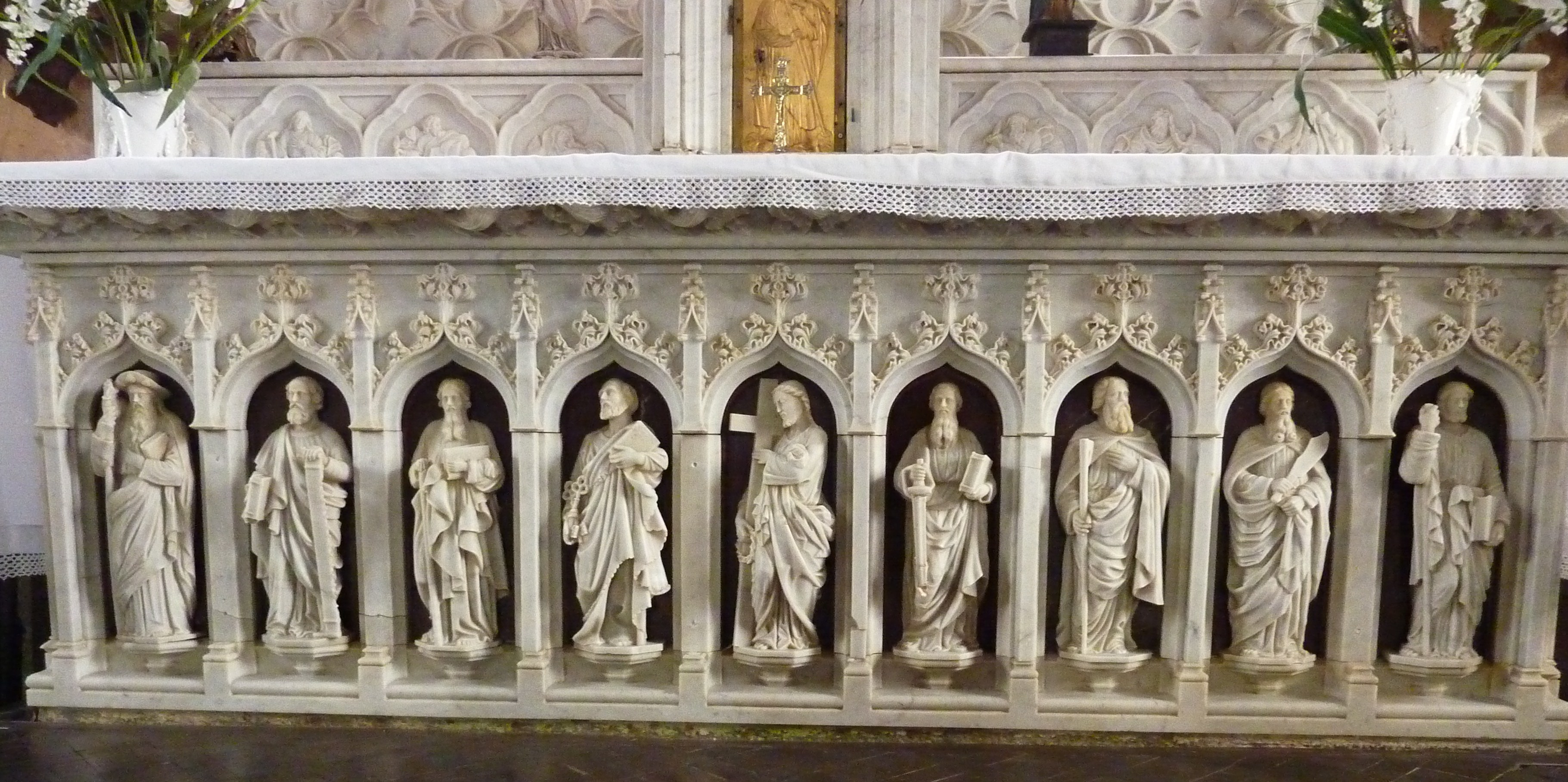 La Feuillée dans le département français du Finistère : l'autel de l'église Saint-Houardon (sculpté par Yann Larc'hantec en 1866).